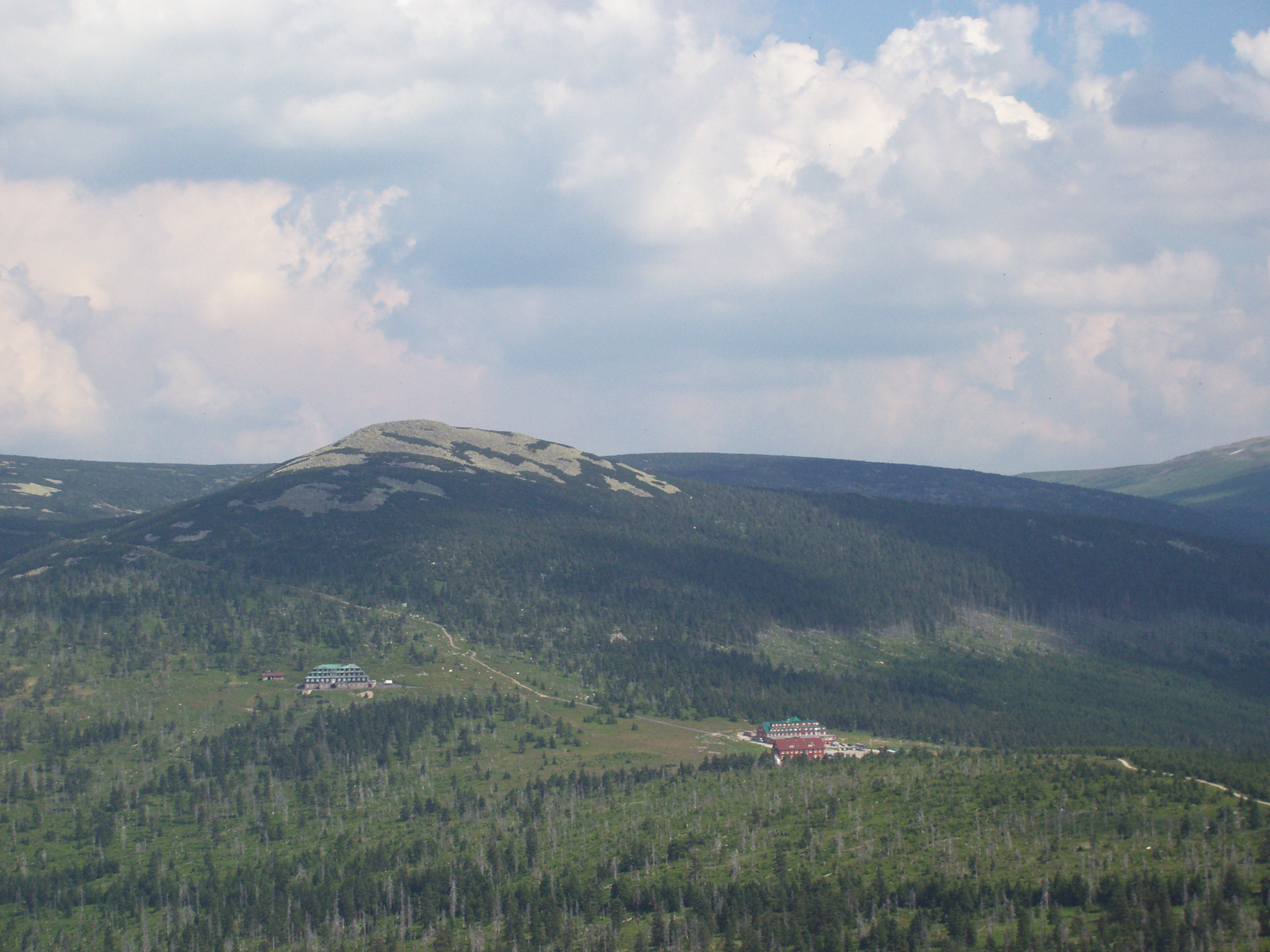 Widok na przełęcz karkonoską. Od lewej polskie schronisko Odrodzenie oraz czeska Spindlerova buda (Karkonosze, Polska)